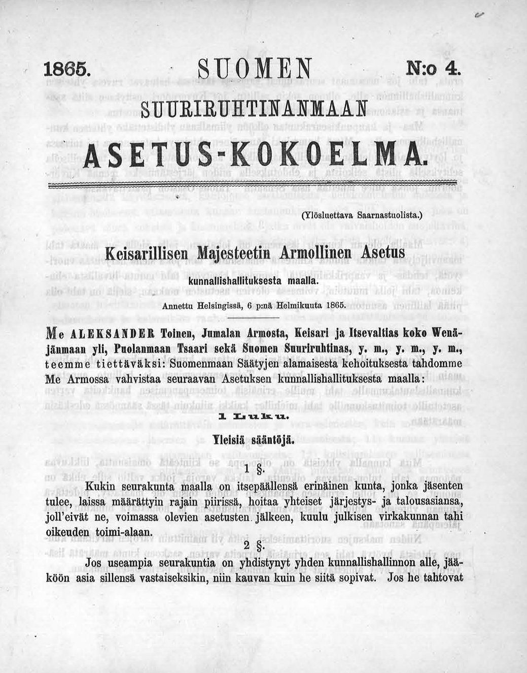 Vuoden 1865 kunnallisasetuksen ensimmäinen sivu Asetuskokoelmasta.